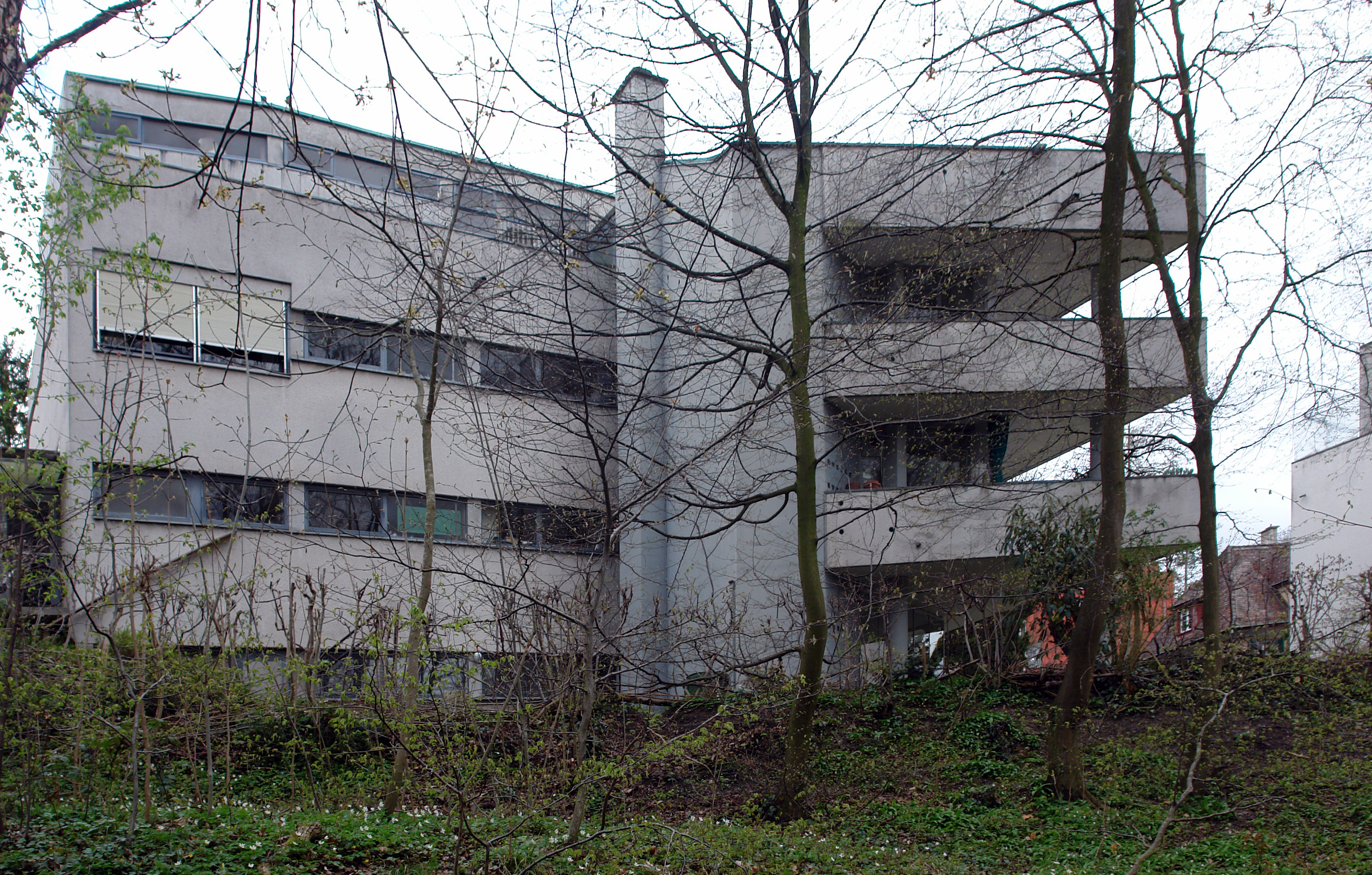 Mehrfamilienhäuser Doldertal, Zürich, 1933-36 in Switzerland, Architects: Alfred Roth, Emil Roth, Marcel Breuer, Facade to Wolfbach, Adjoining rooms